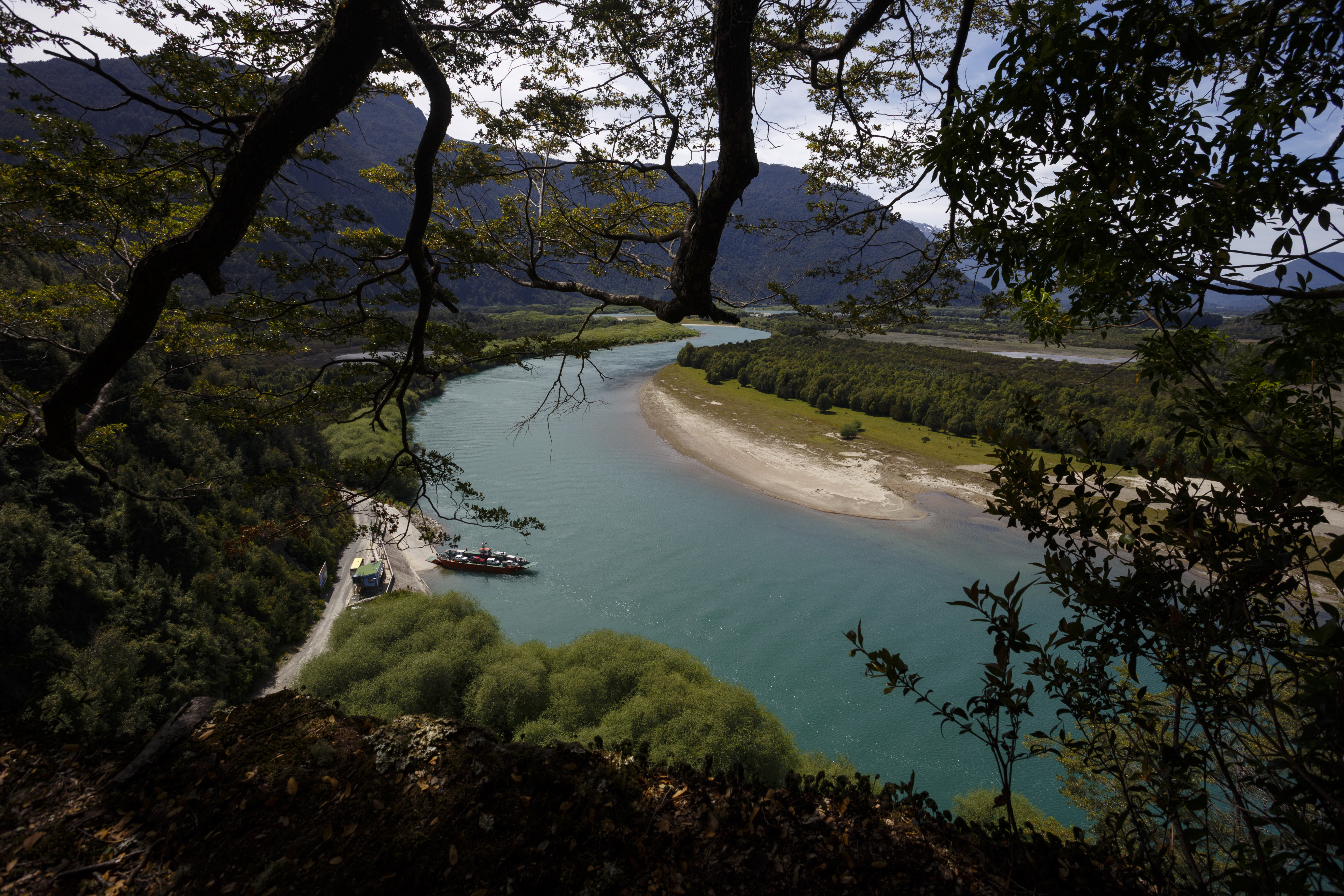 Punta Maldonado, lago Tagua Tagua, Cochamó, Chile.